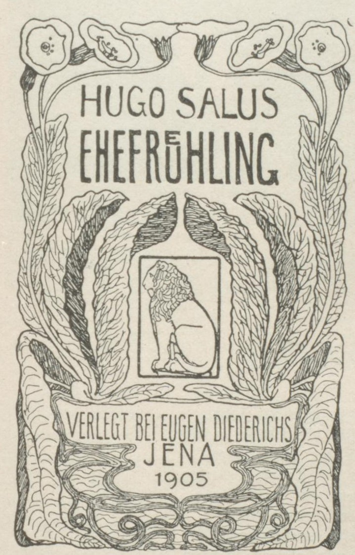 Heinrich Vogeler Hugo Salus Ehefrühling 1905